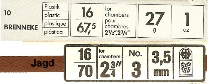 Packungsangaben bei Flintenmunition